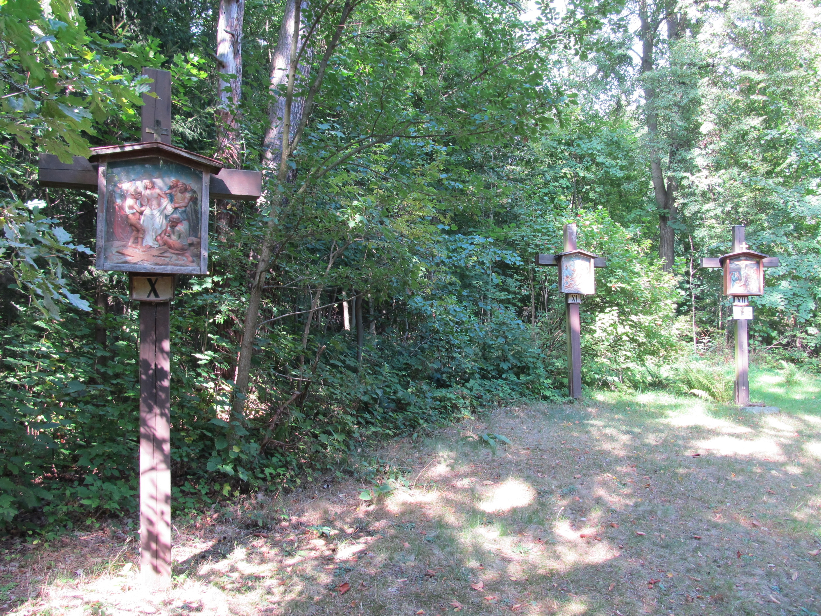 Kaple - soubor kapliček a Božího hrobu (Malé Svatoňovice), Mariánský sad, Malé Svatoňovice